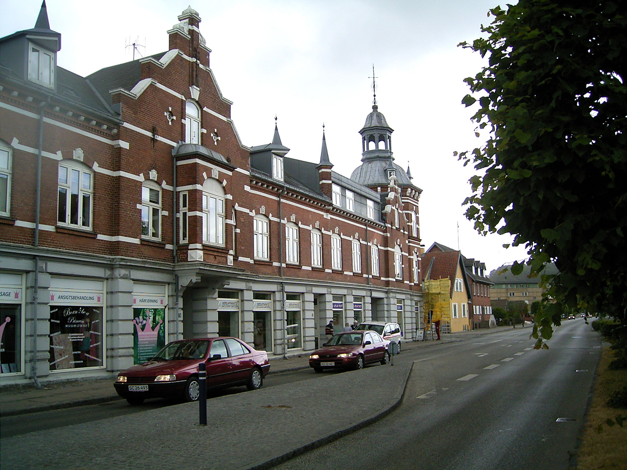 Jernbanegade in Hobro